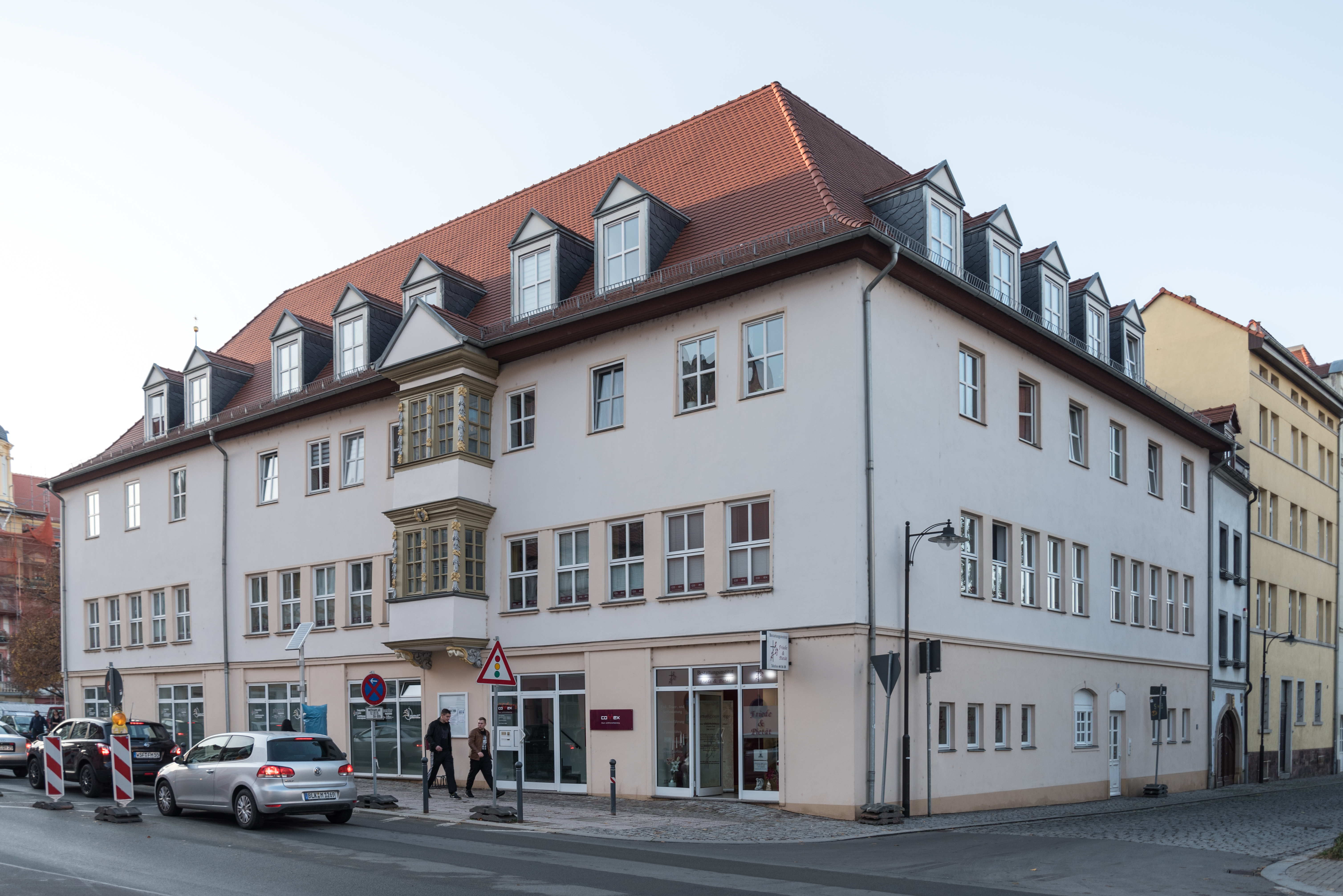 Weißenfels, Markt 8